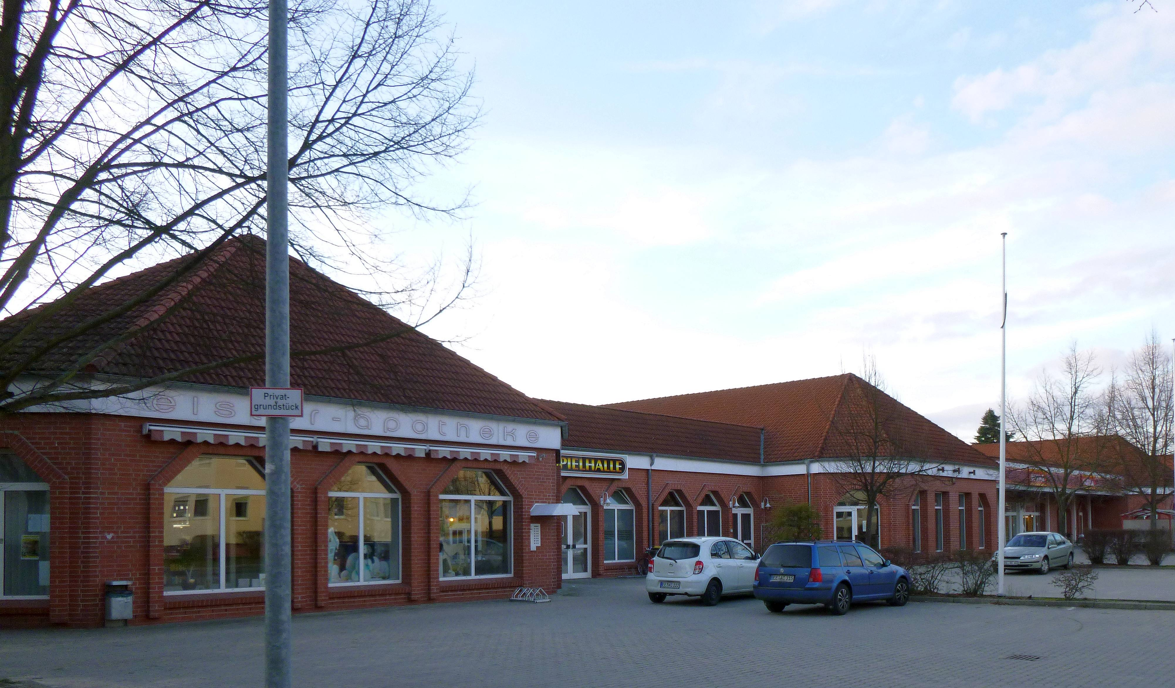 Einkaufszentrum am Lindenweg im Elsterwerda Stadtteil Elsterwerda-West